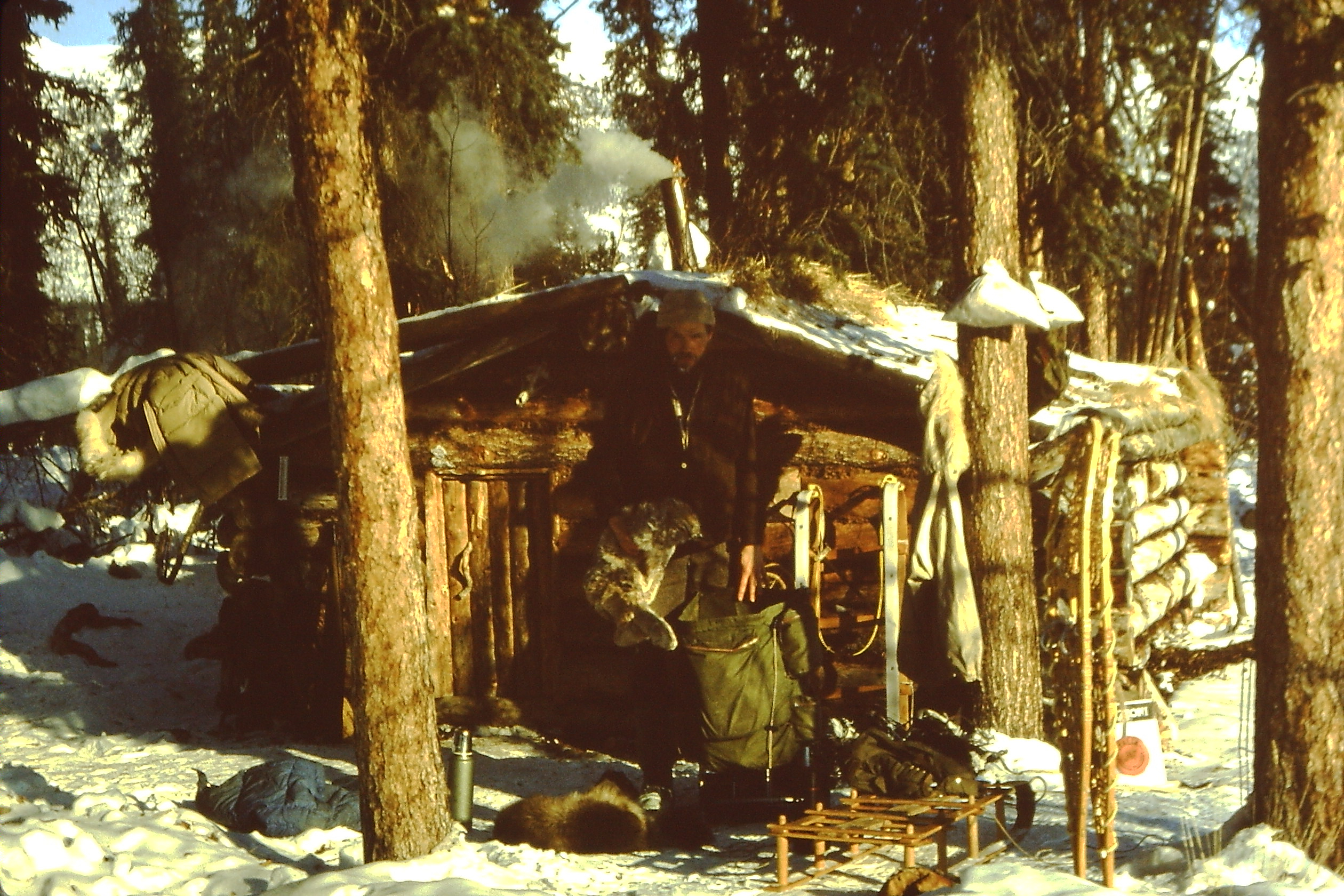 Brooks Range, Alaska. The cabin (die Trapperhütte).